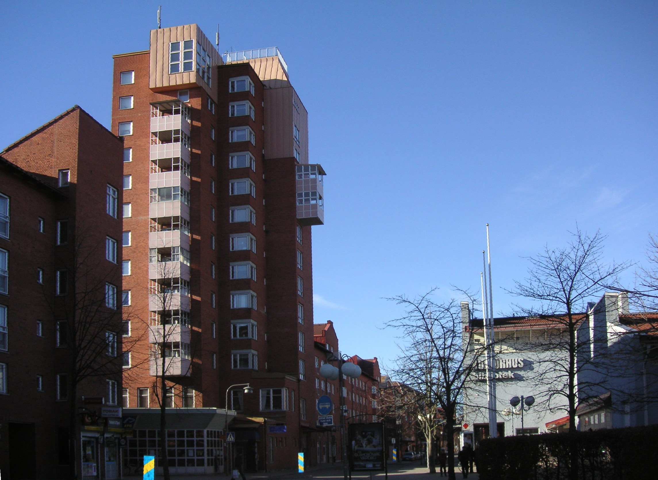 Skarpnäcks Allé i Stockholm